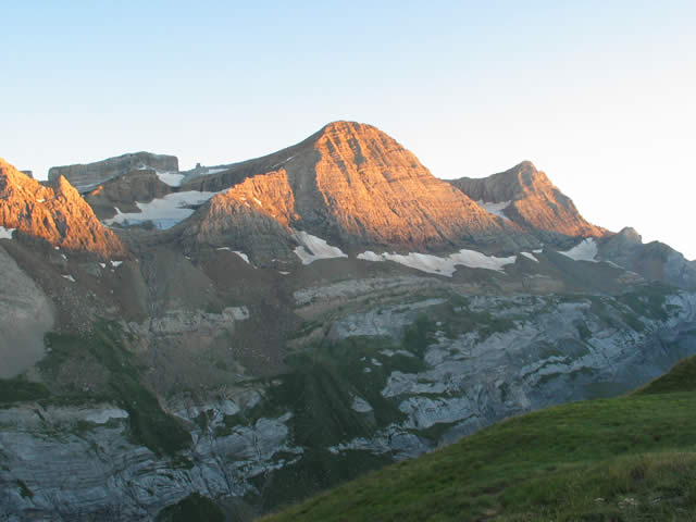 Pic du Taillon depuis le pic de la Pahule